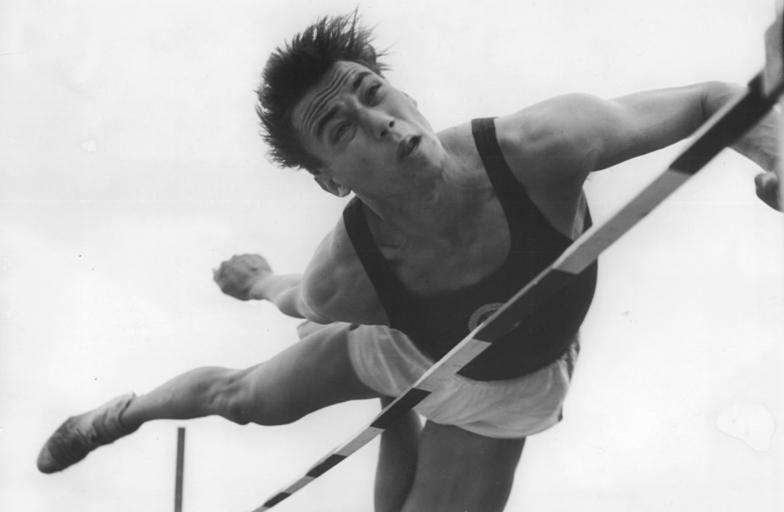 Werner Pfeil Zentralbild Wend-Ulm. 18.8.1958 Hochspringer Werner Pfeil Werner Pfeil (Karl-Marx-Stadt) wird im Hochsprung bei den Leichtathletik-Europameisterschaften 1958 in Stockholm an den Start gehen. UBz: Werner Pfeil beim Sprung.